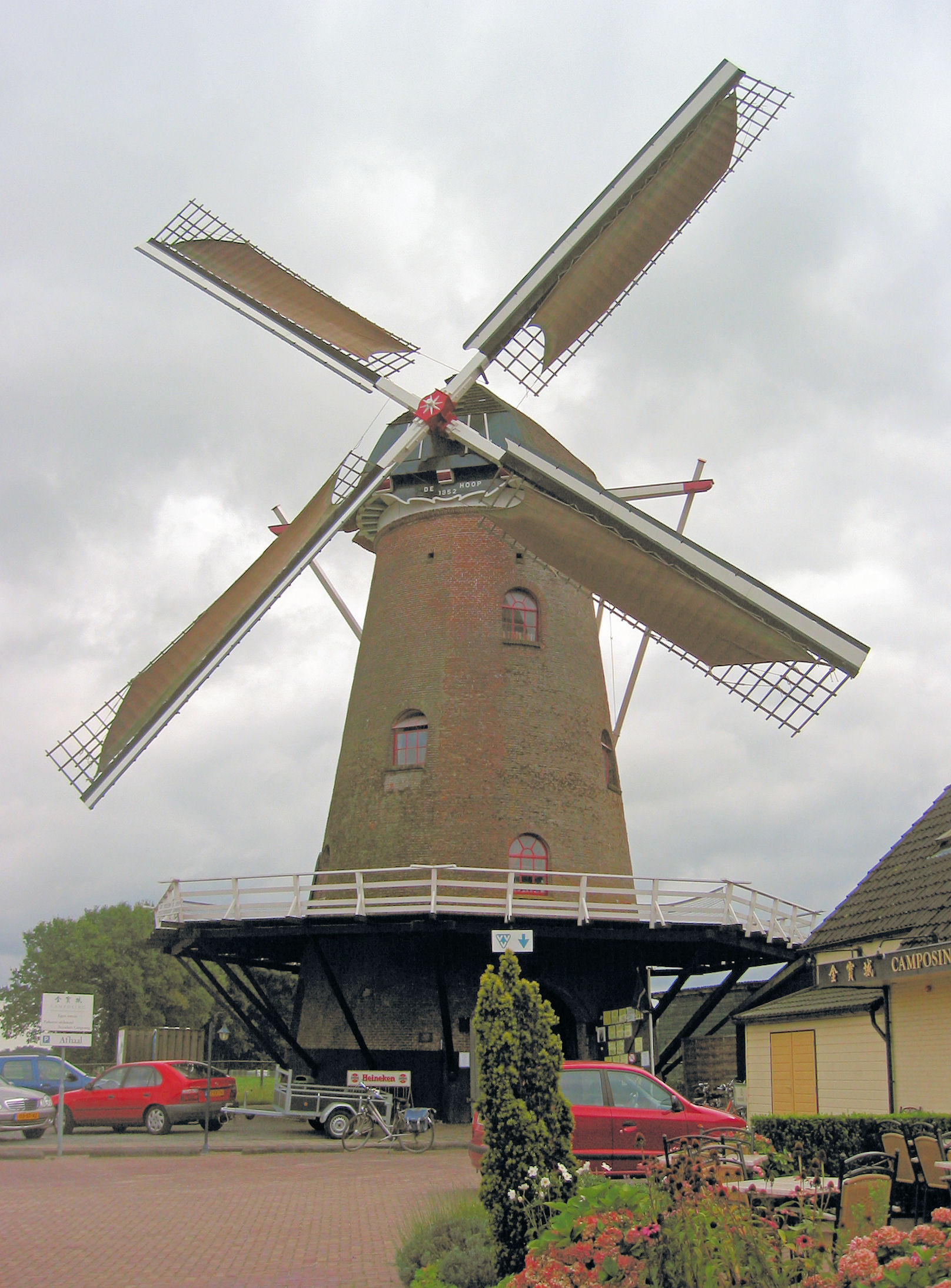 De Hoop in Garderen, 4 duikers, Gelderland, the Netherlands